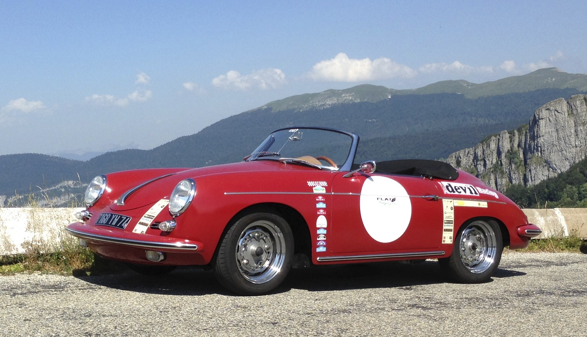 N° de chassiq 87148